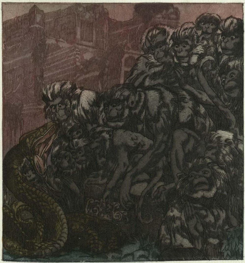 Illustration du Livre de la jungle de Kipling.